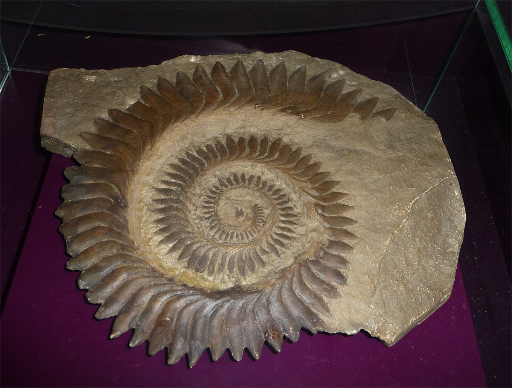 spirale dentaire d'helicoprion